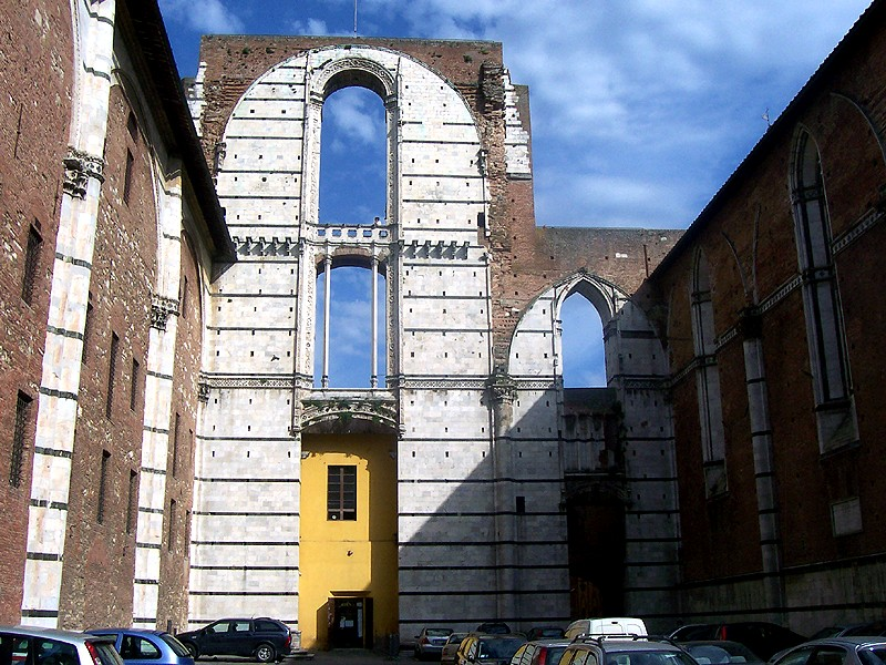 Siena - Facciatone